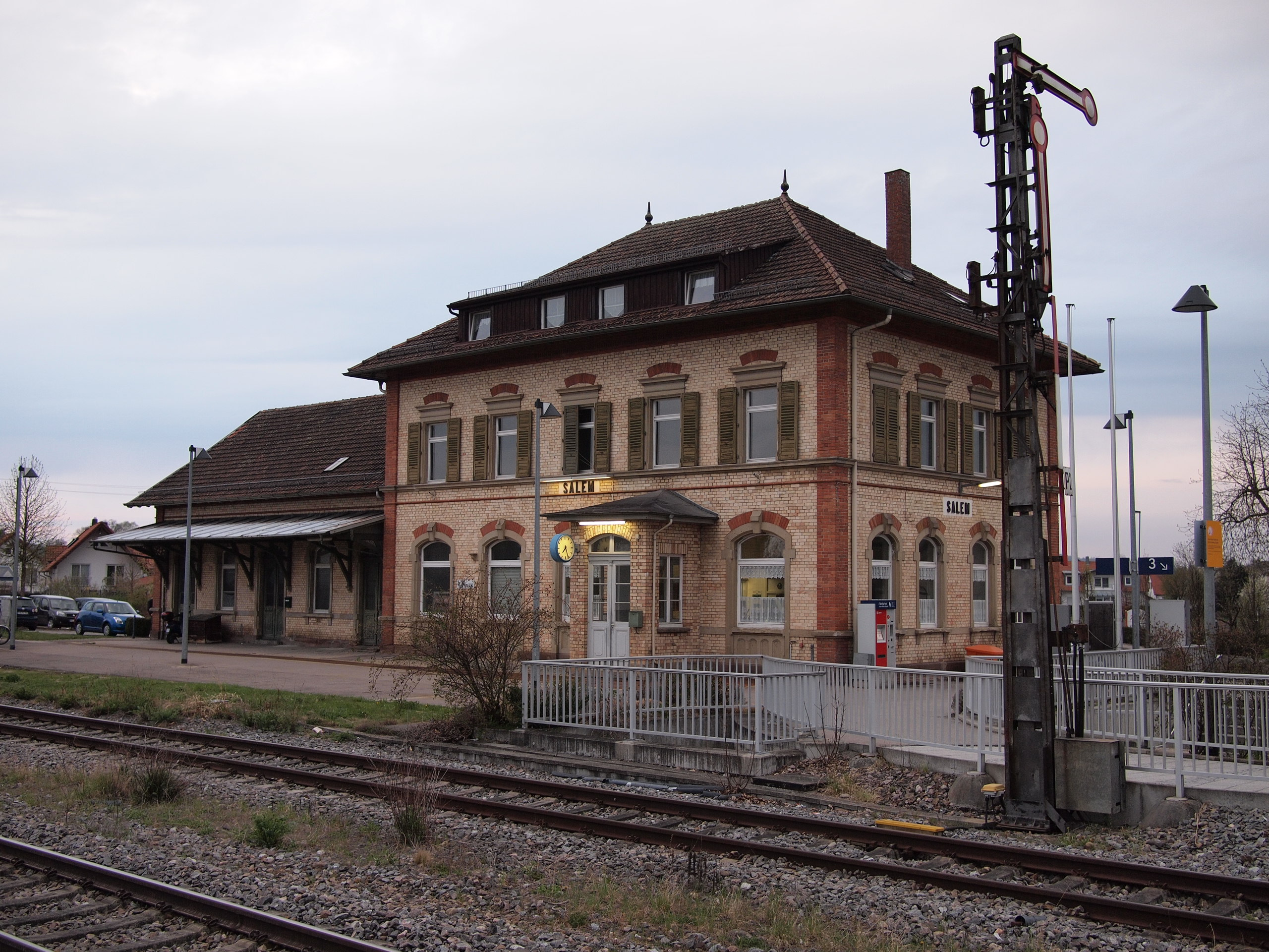 Das Bahnhofsgebäude in Salem(Baden)